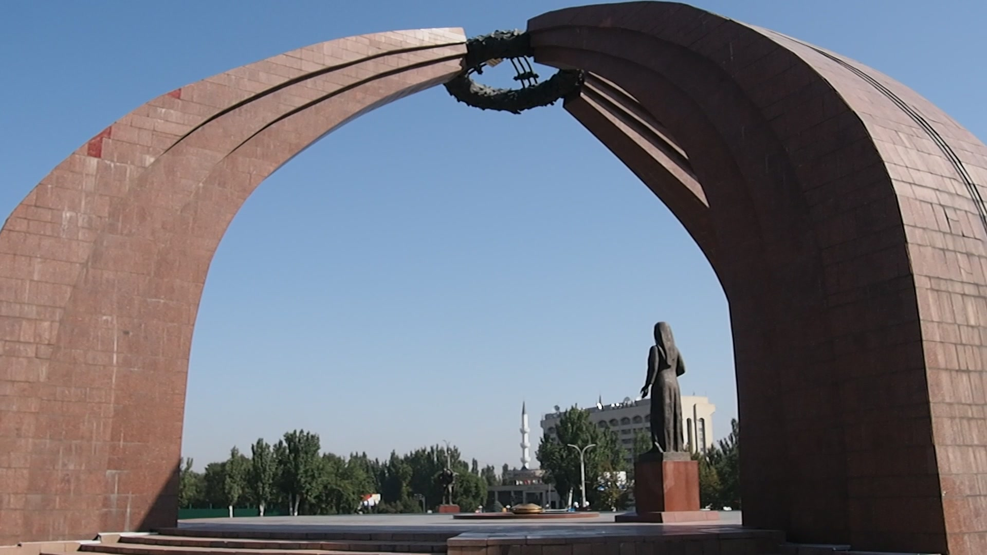 P9170497 60